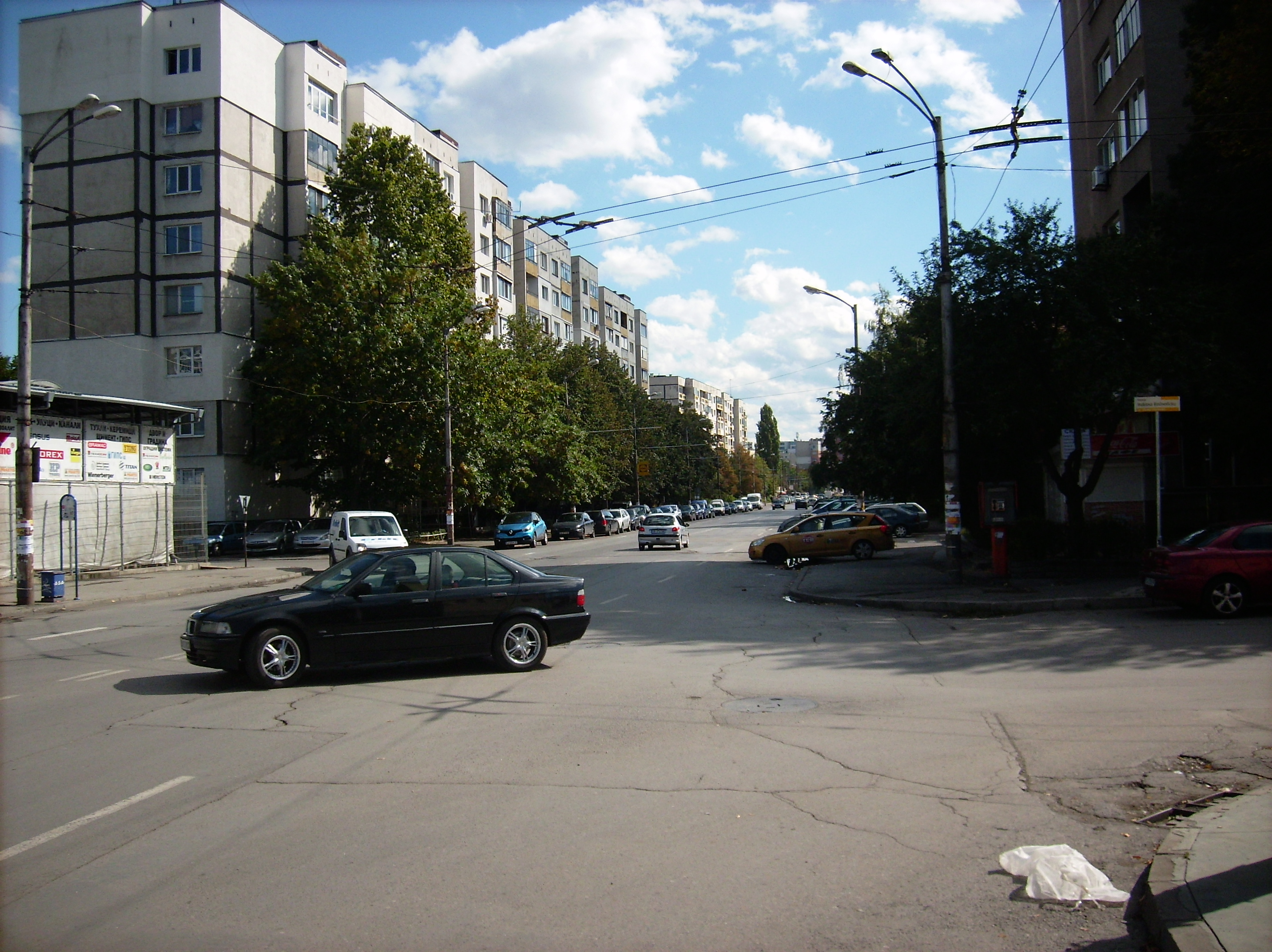 Поглед към улица "Макгахан" в ж.к "Хаджи Димитър" в София